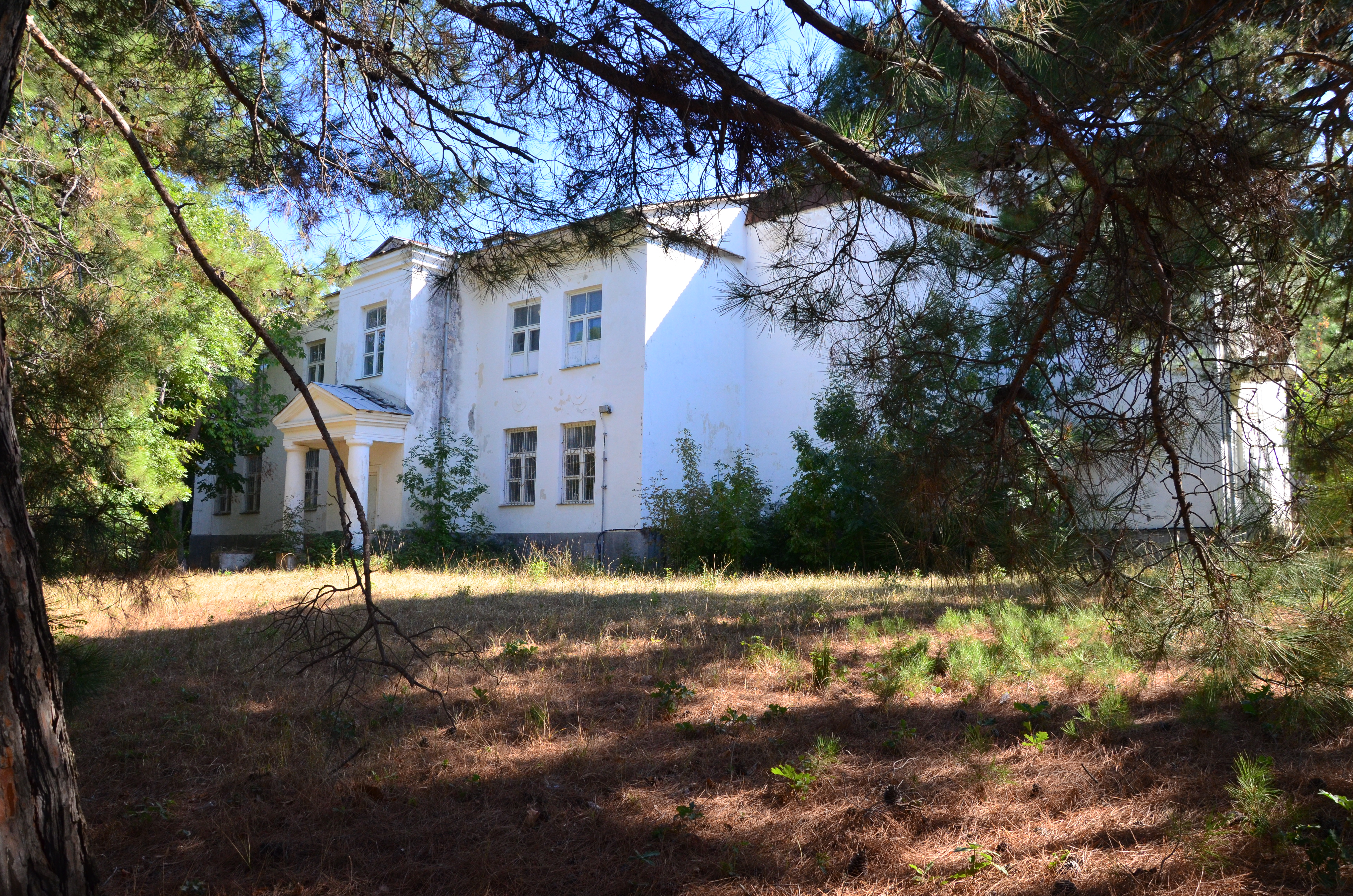 Дом, в котором жил видный революционер-народник Фроленко А.М.: улица Революционная, 45 (Толстый мыс), Геленджик, Краснодарский край